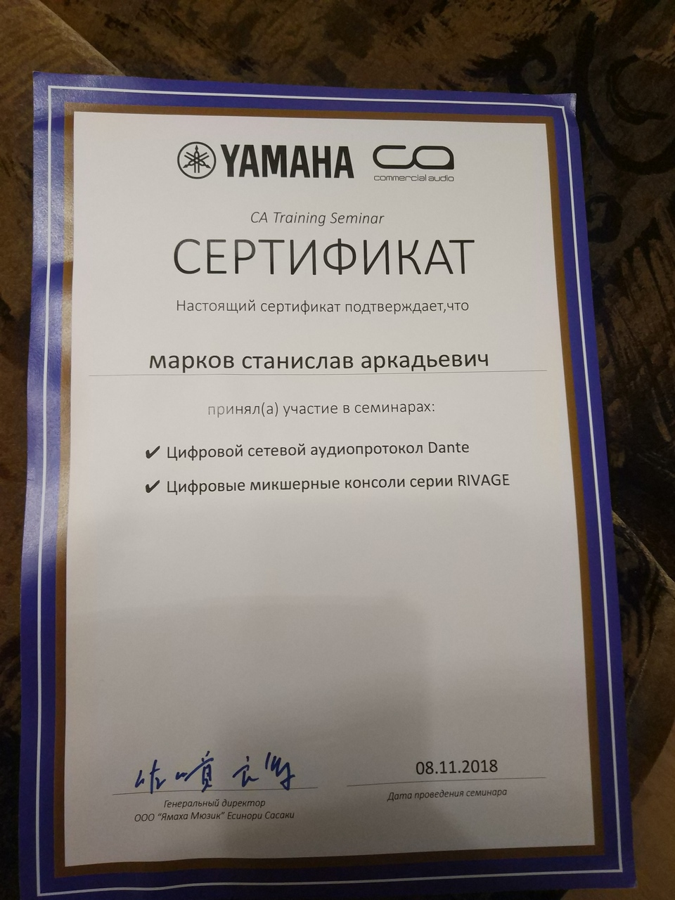 Сертификат о прохождении семинара Yamaha, выданный Станиславу Маркову.